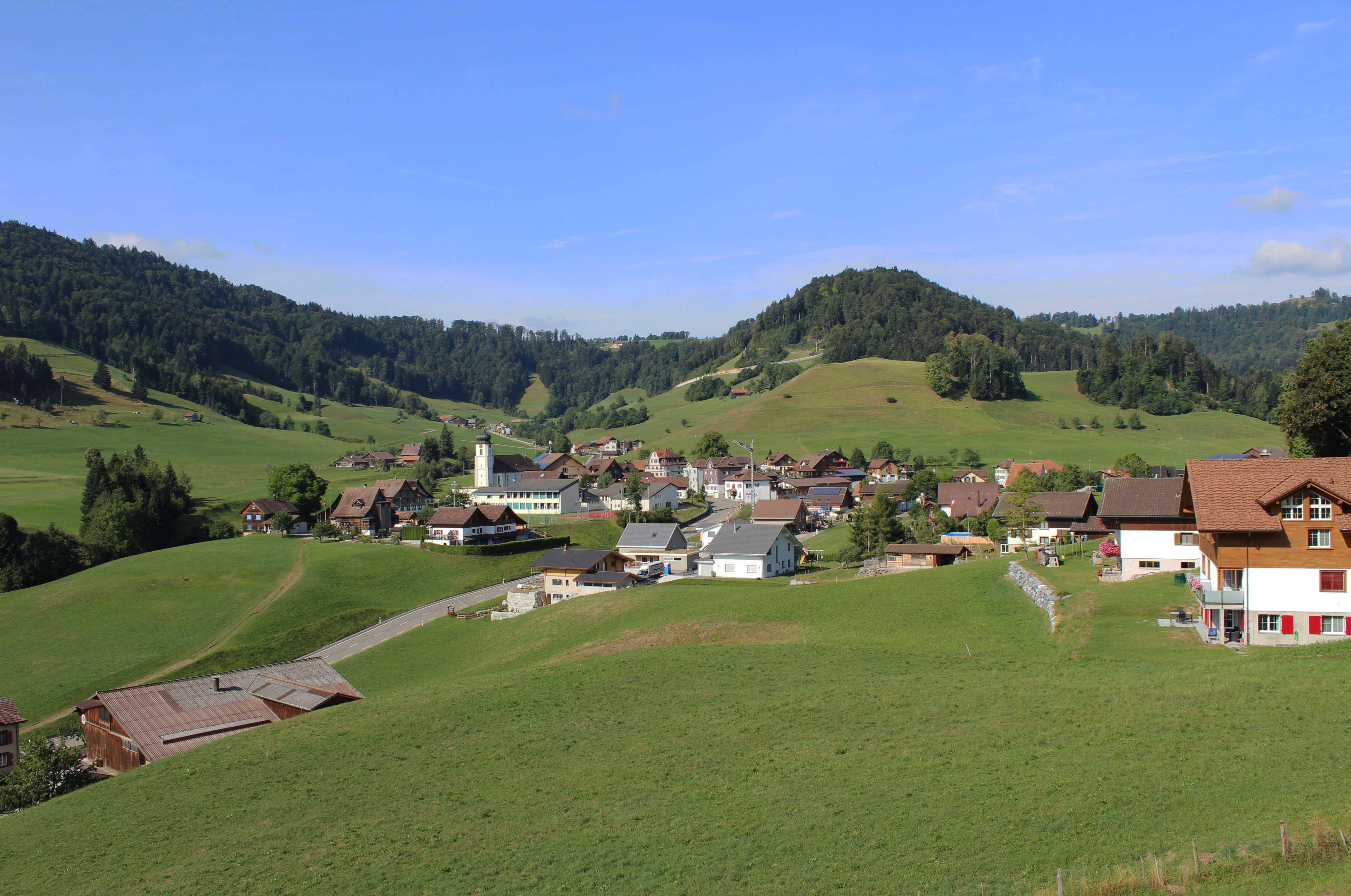 Mühlrüti bei Mosnang, Schweiz aus Richtung Osten